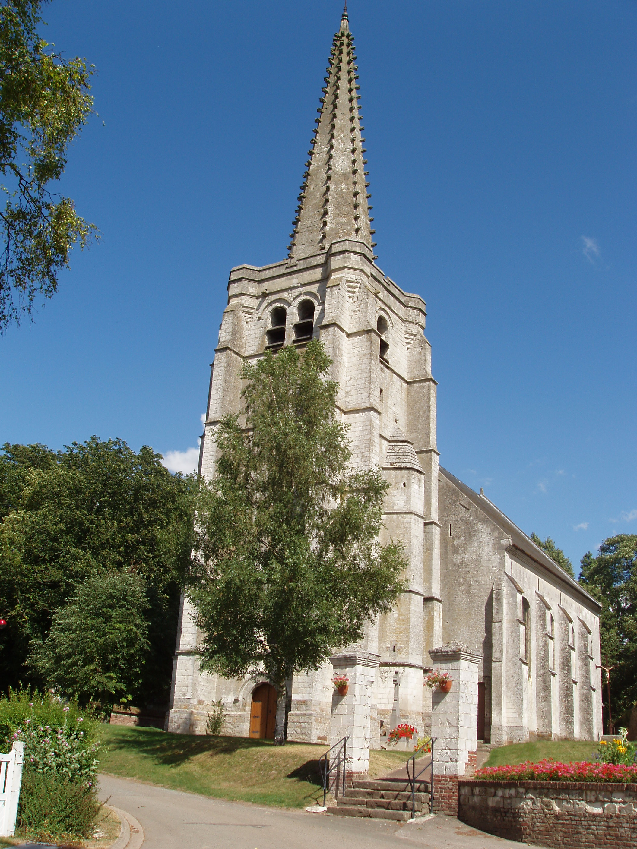 Photo de l'église en été - l'arbre devant a toutes ses feuilles, éclairage différent.